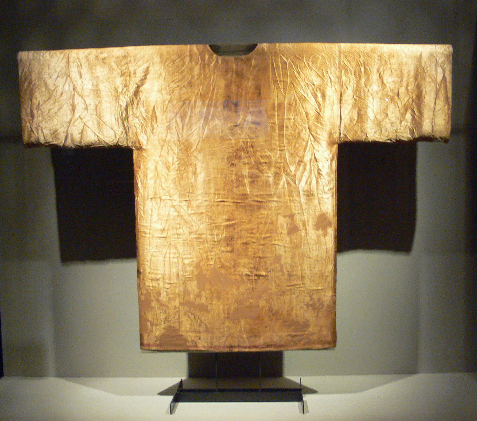 Diözesanmuseum Bamberg Ornat Clemens II.